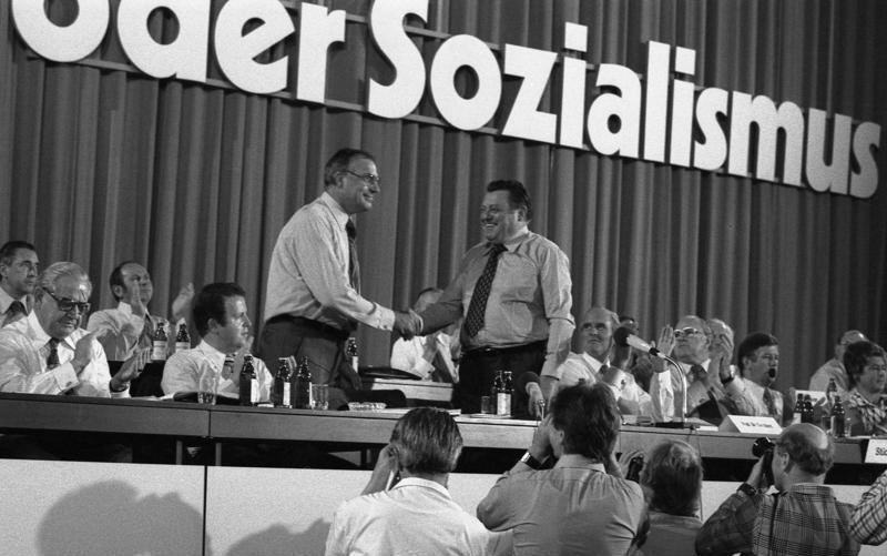 CSU-Wahlparteitag 1976 in München (v.l.n.r.: Alfons Goppel, Gerold Tandler, Helmut Kohl, Franz Josef Strauß, Karl Carstens, Richard Stücklen, Kurt Hans Biedenkopf) 25.-26.6.1976